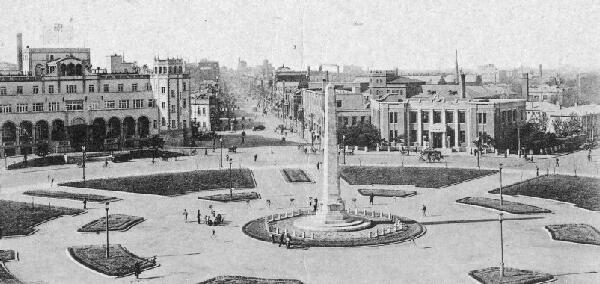 奉天中央大広場